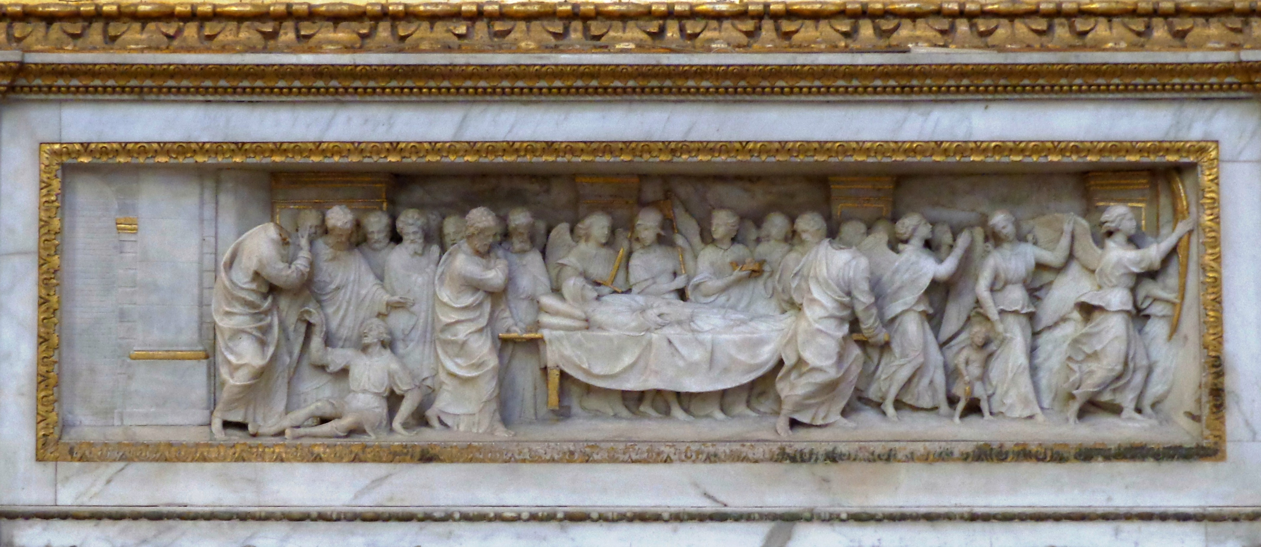 Bassorilievo "Sepolcro di Maria e il corteo degli Apostoli"